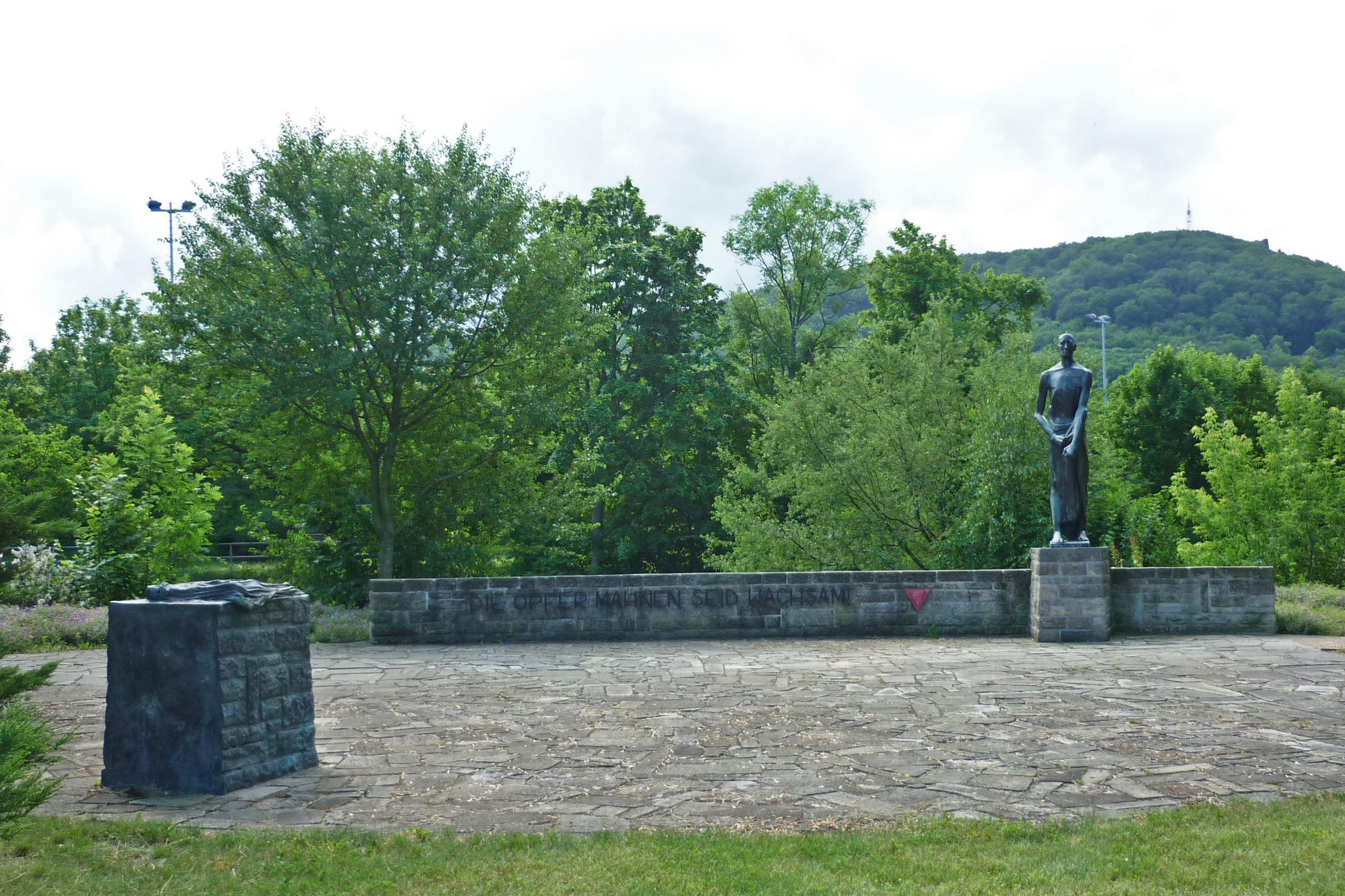 OdF-Denkmal in der Albert-Schweitzer-Str. in Freital-Döhlen mit Plastik von Wieland Förster